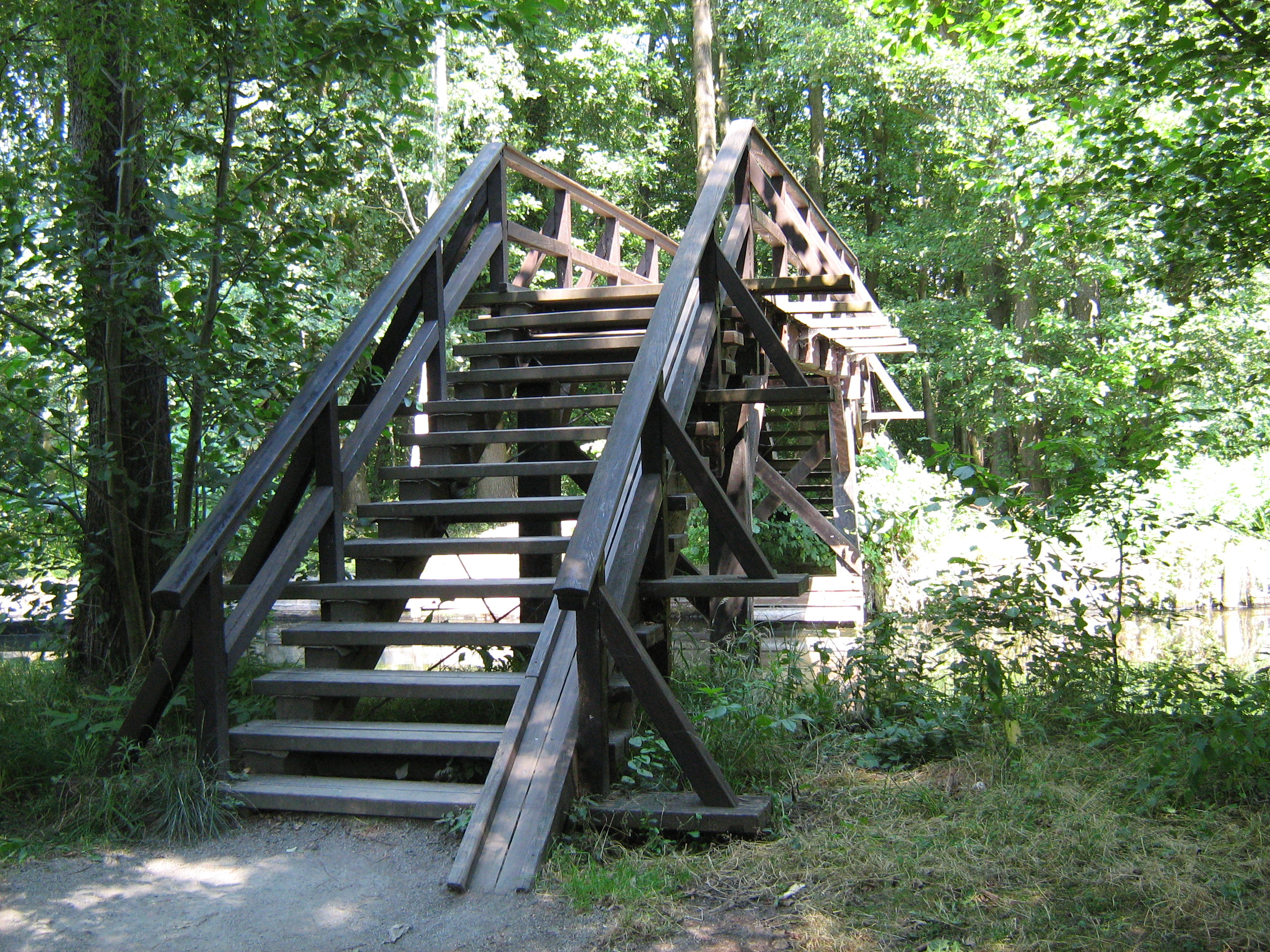 Brücke im Spreewald. Auch fürs Fahrrad (Gurkenradweg)